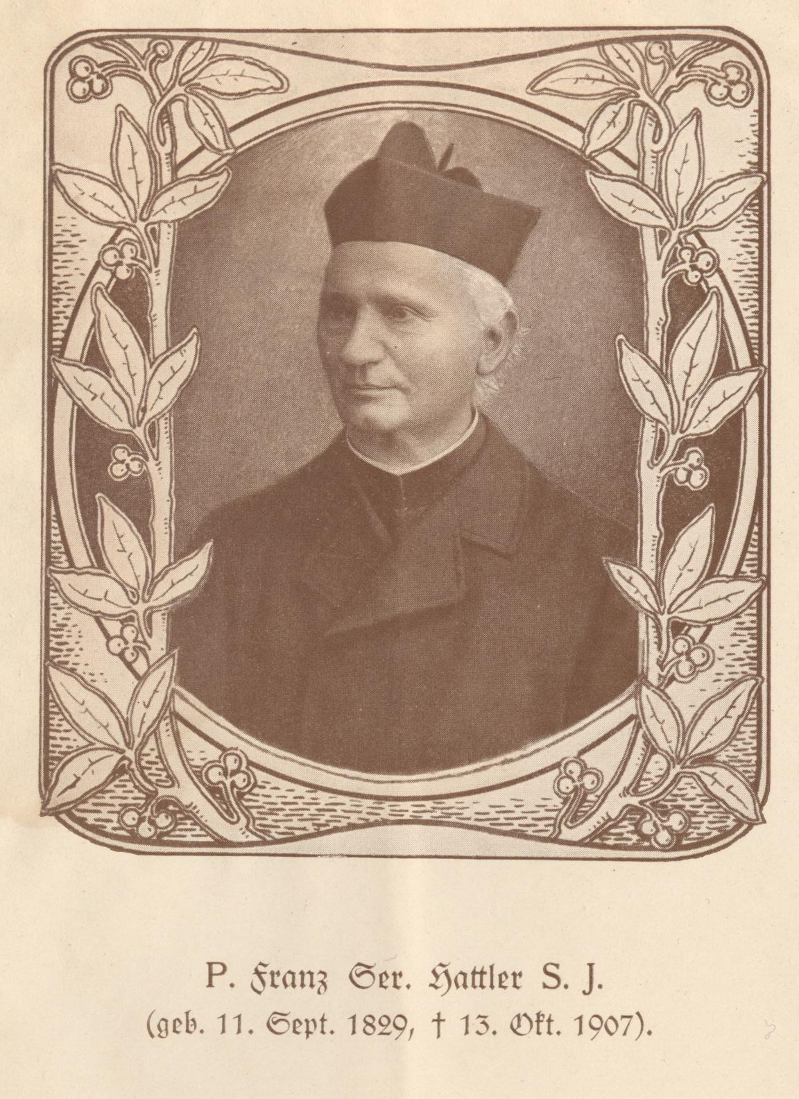 Pater Franz Seraph Hattler S.J. Volksschriftsteller, Tirol